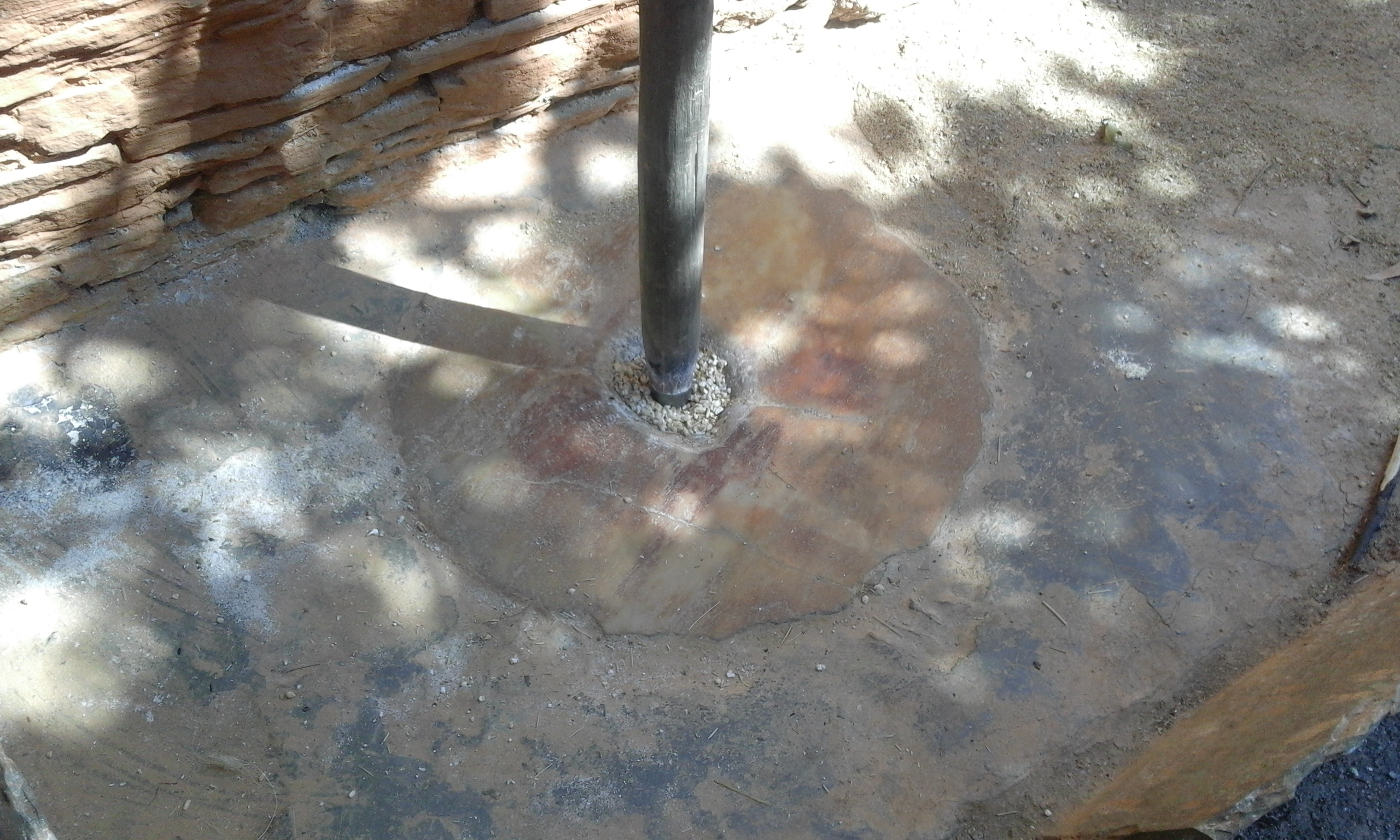 नेपाली: ढुंगाबाट बनाएको ओखल र काठबाट बनेको मुसल